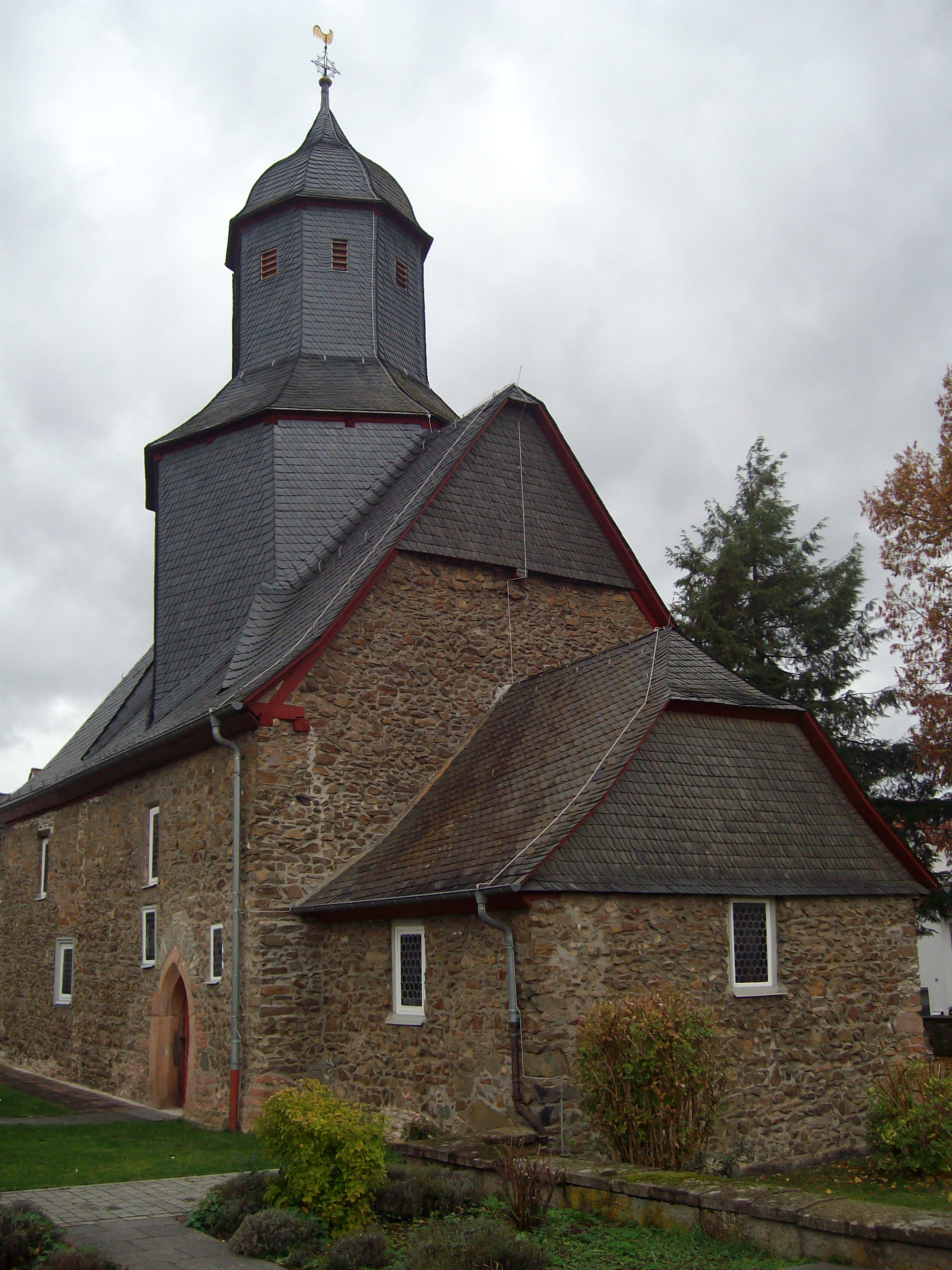 Evangelische Kirche Frankenbach, Gemeinde Biebertal, Landkreis Gießen, Hessen, Deutschland